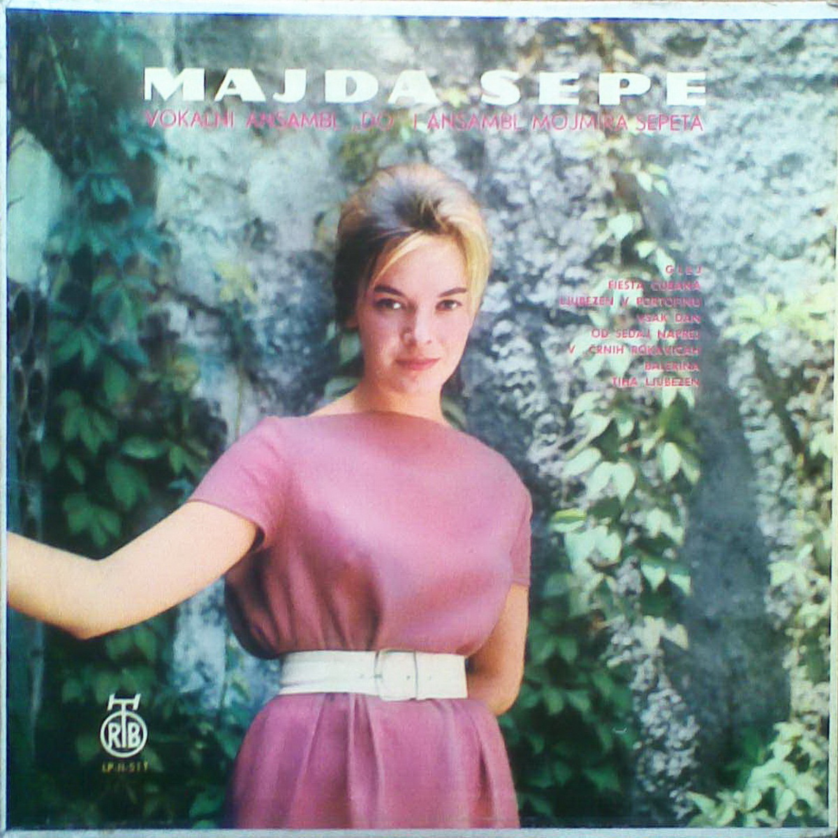 Album Glej pevke Majde Sepe.